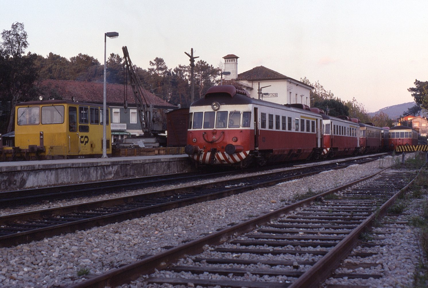 28.11.90 Serpins DMUs